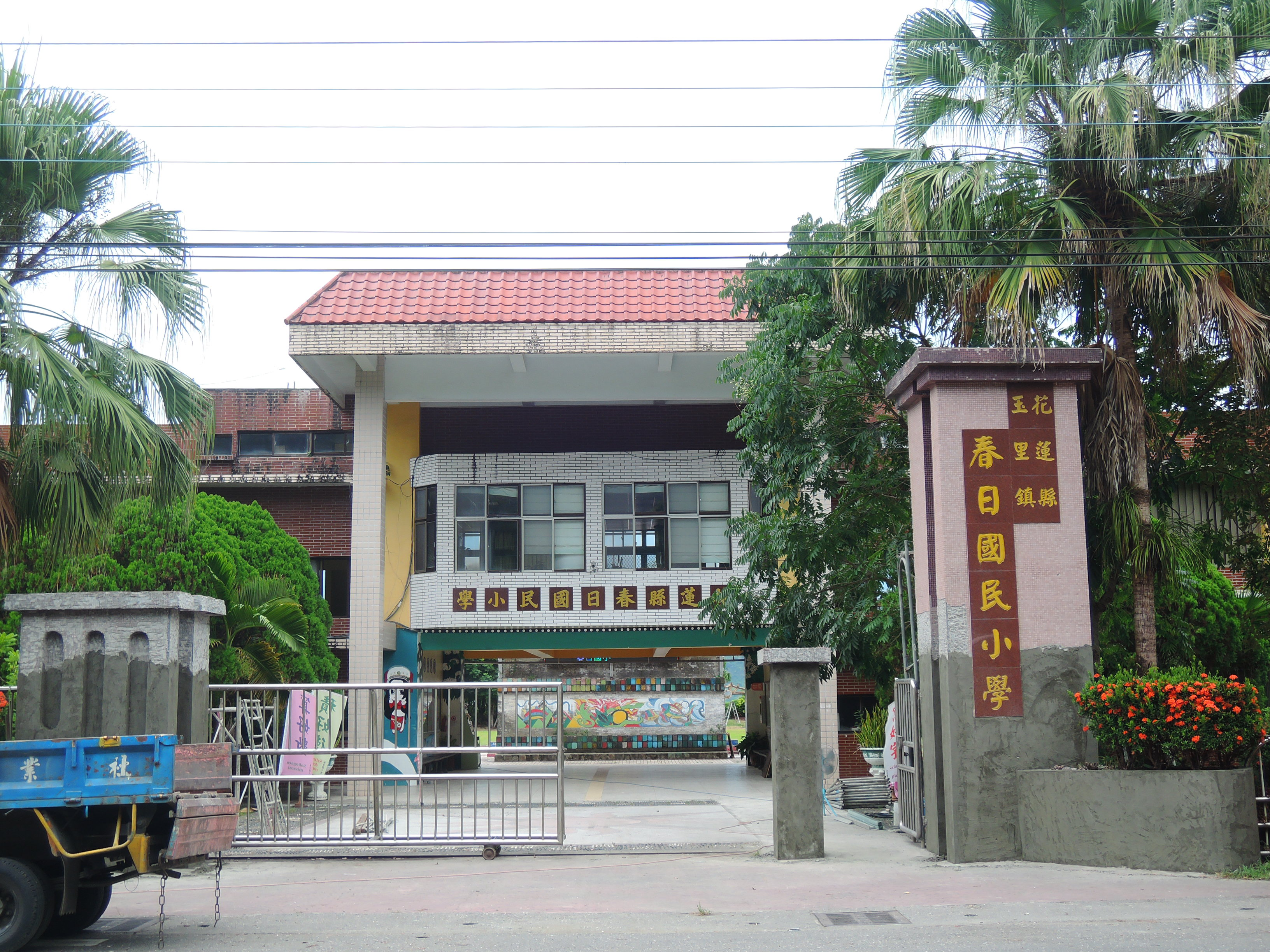 台灣 981 花蓮縣玉里鎮泰林95號